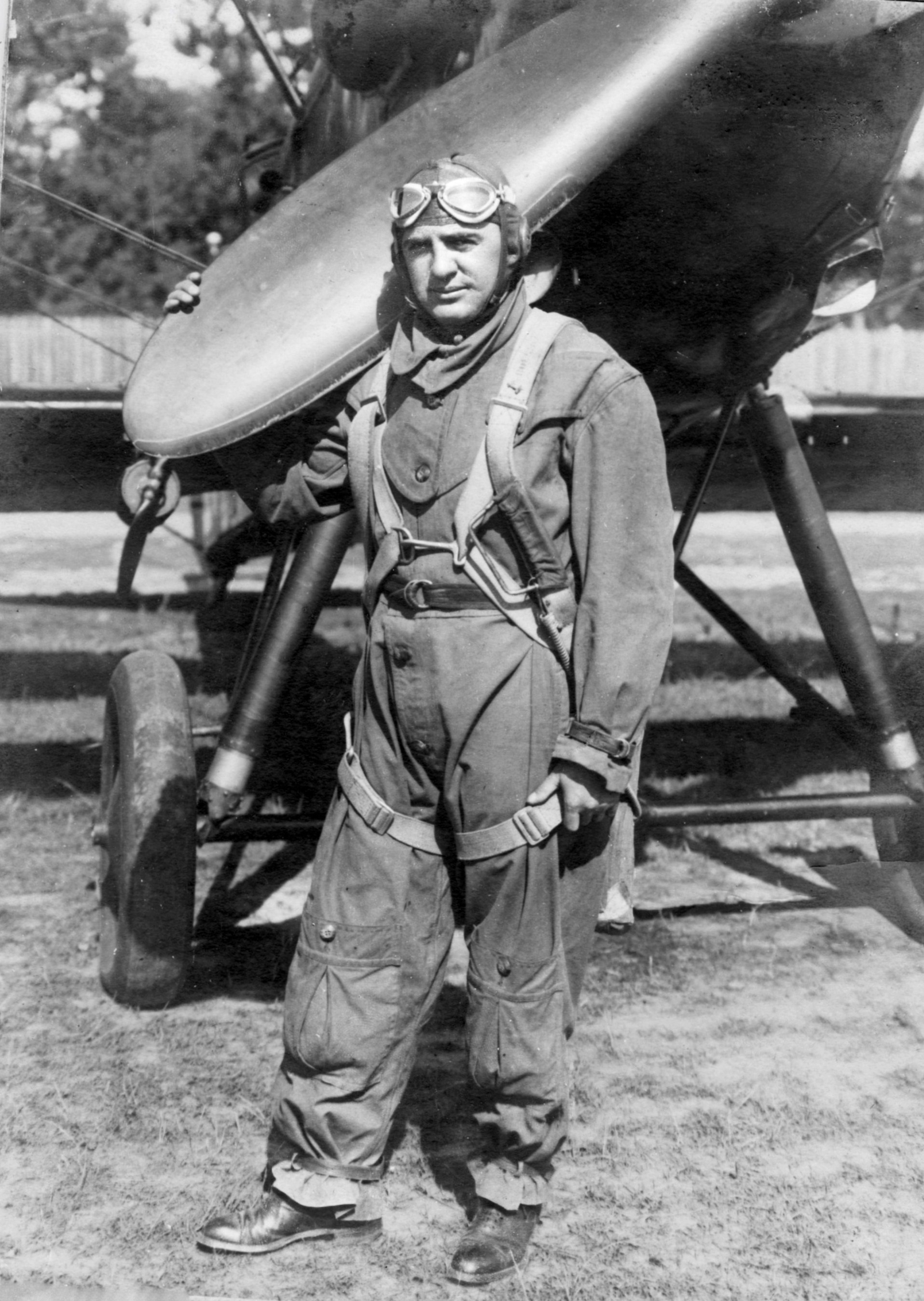 Mieczysław Halicki obok samolotu Potez XXV, który był przez niego pilotowany w I Pułku Lotniczym w Warszawie. Zdjęcie wykonano w 1938 roku.